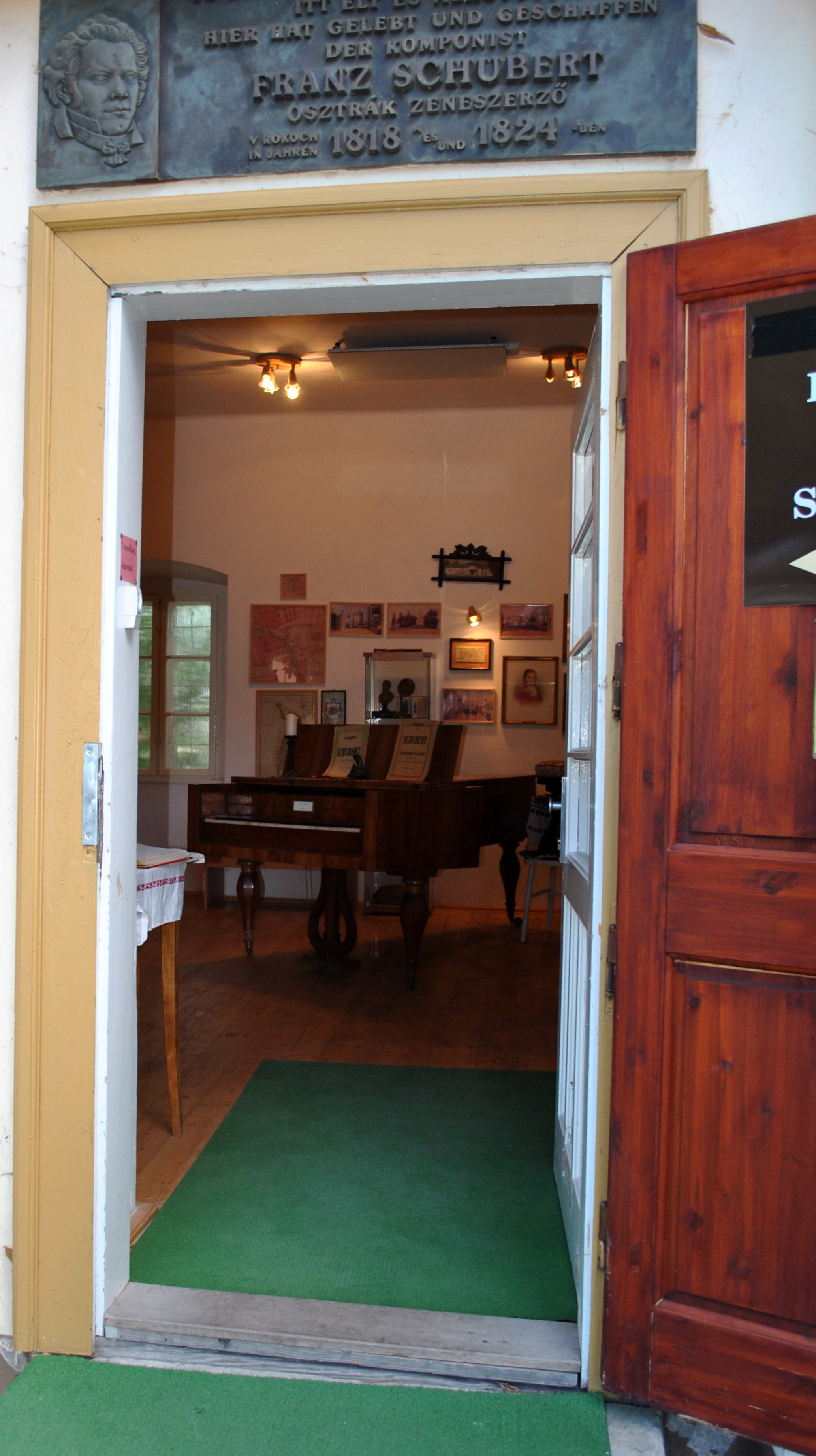 Múzeum Zselízen és Franz Schubert emlékszoba . Az ú.n. Bagolyvár.